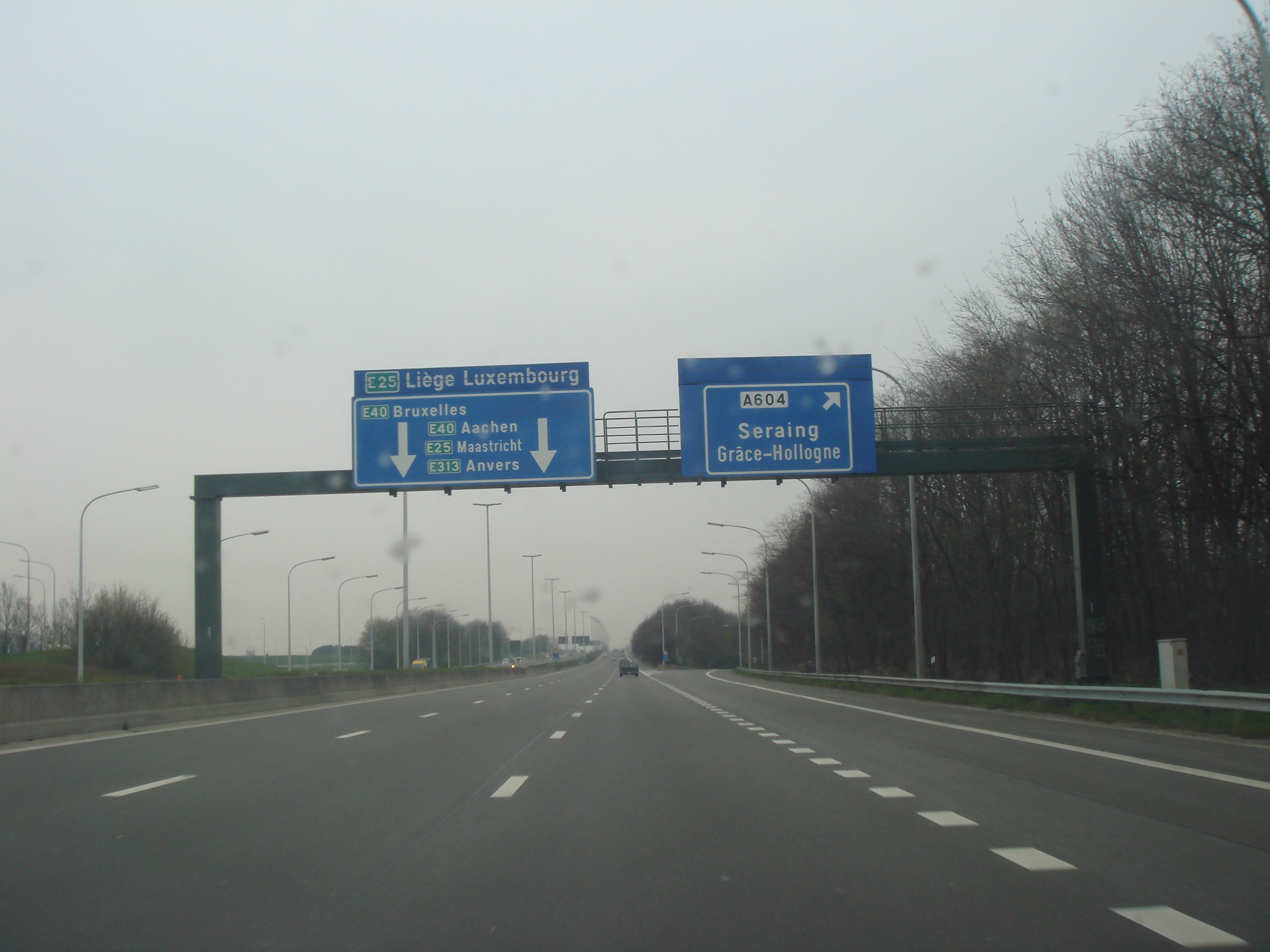 Autoroute belge A604